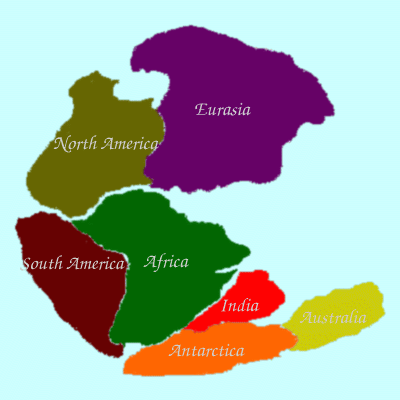 Carte de la Pangée.